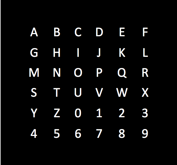 Exemple distribució de símbols en el lletrejador BCI